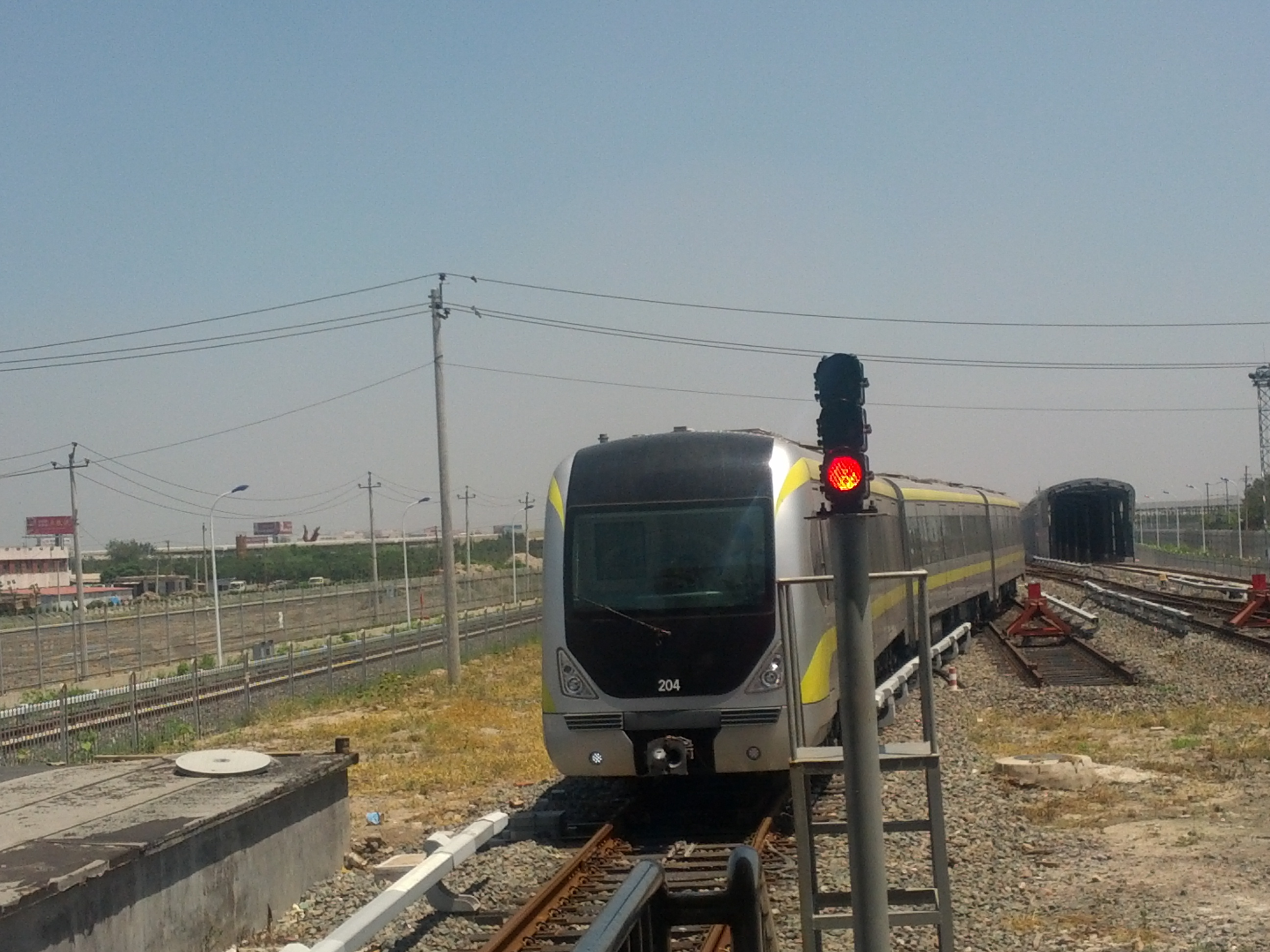 一辆正在空港经济区站折返的天津地铁二号线列车